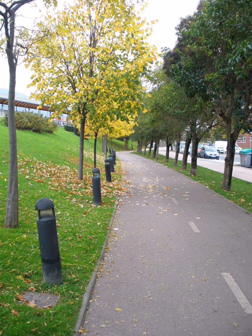 Paisaje urbano de Barakaldo (Bizkaia)